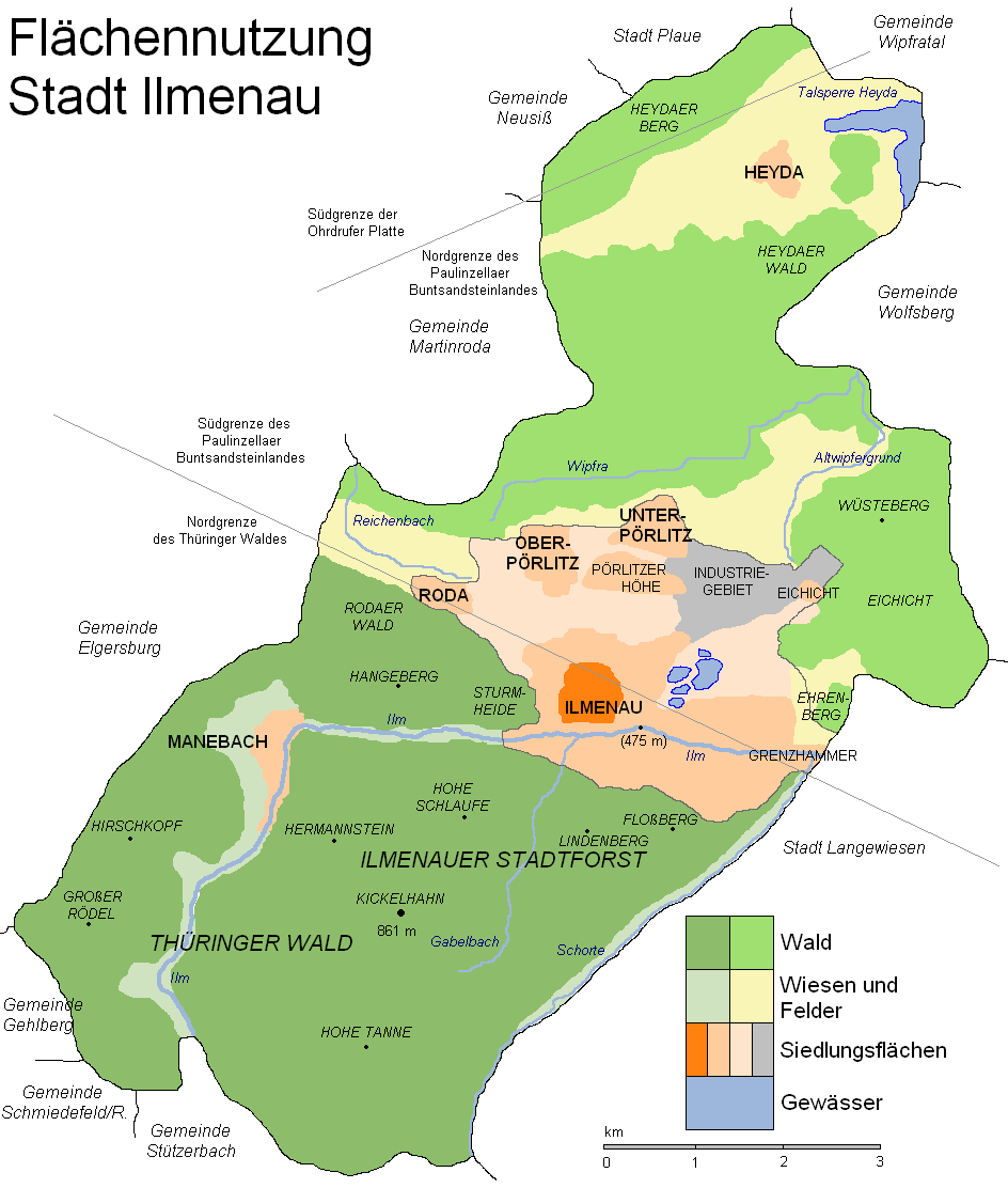 Flächennutzungskarte der Stadt Ilmenau